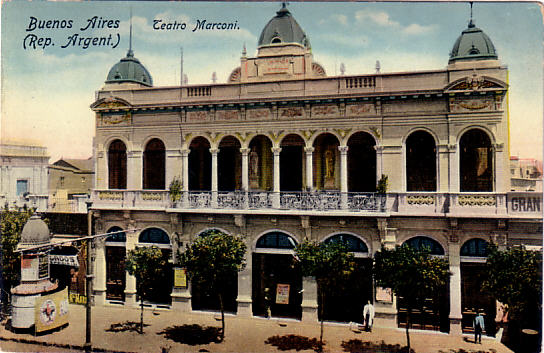 Edificio del Teatro Marconi en Buenos Aires, Av. Rivadavia 2314. Obra del arquitecto Juan Bautista Arnaldi, fue construido en 1903 y demolido en 1967. Tarjeta Postal Ed. N. Tommassi